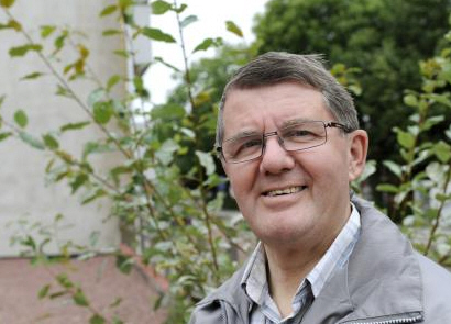 Ålands orgelfestivals ordförande 1989-2001